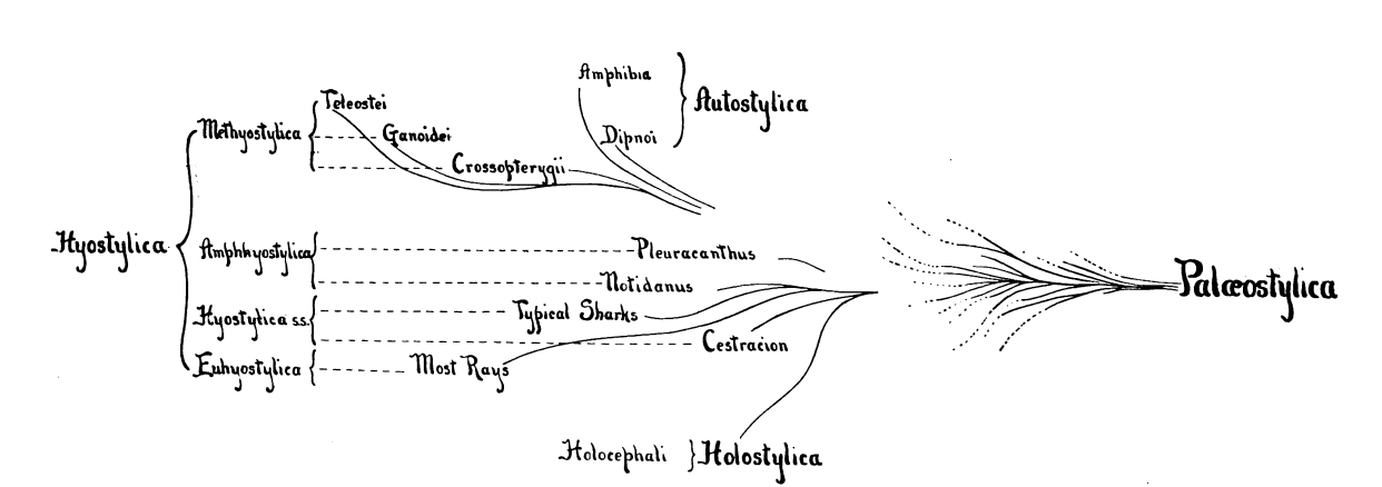 Fig 1. Aplicación de los nuevos términos en GREGORY, W. K. (1904-06). «THE RELATIONS OF THE ANTERIOR VISCERAL ARCHES TO THE CHONDROCRANIUM». The Biological Bulletin 7 (1): 55-69.